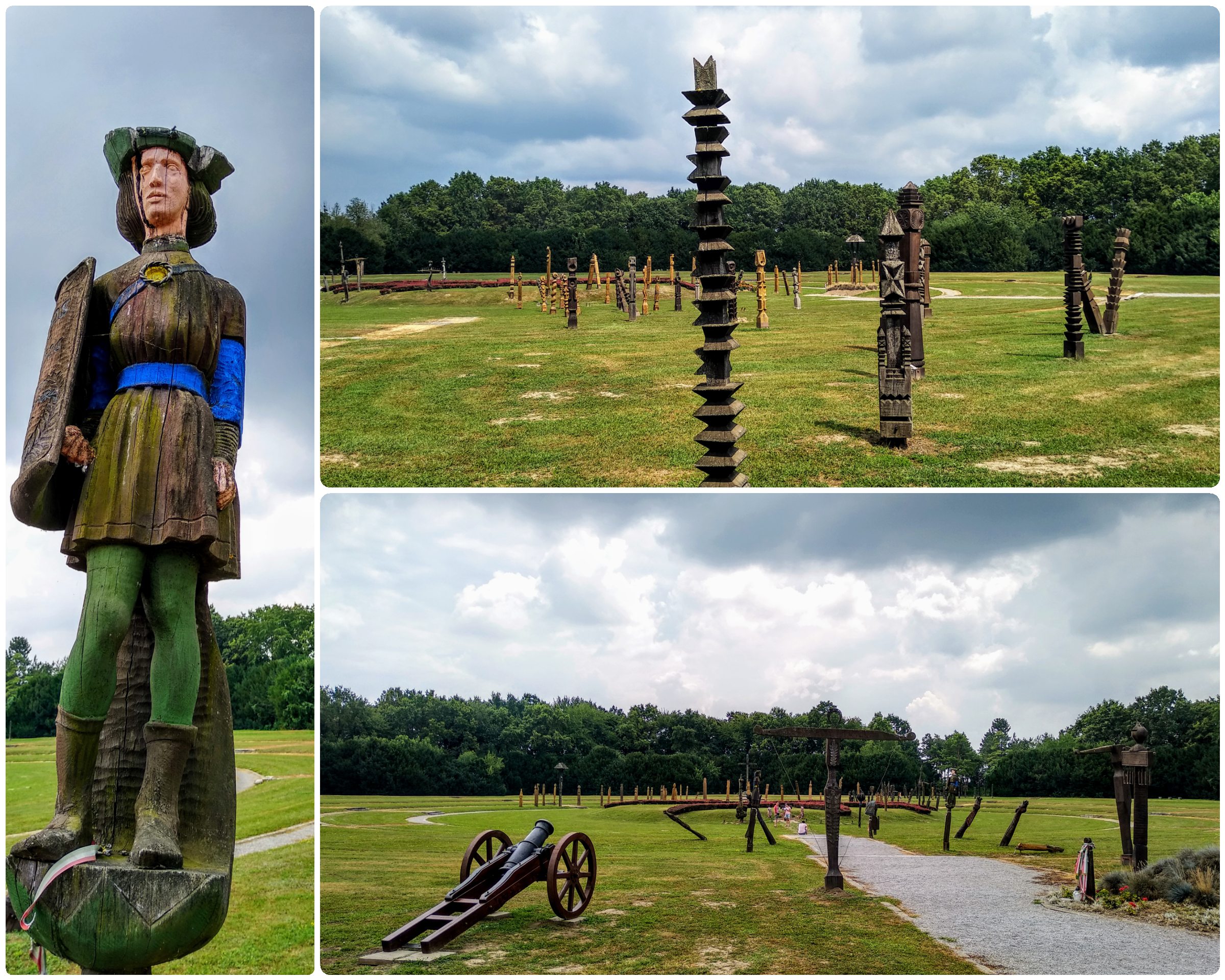 Památník Bitvy u Moháče "Mohácsi Nemzeti Emlékhely" 45°56'34.4"N 18°38'48.3"E